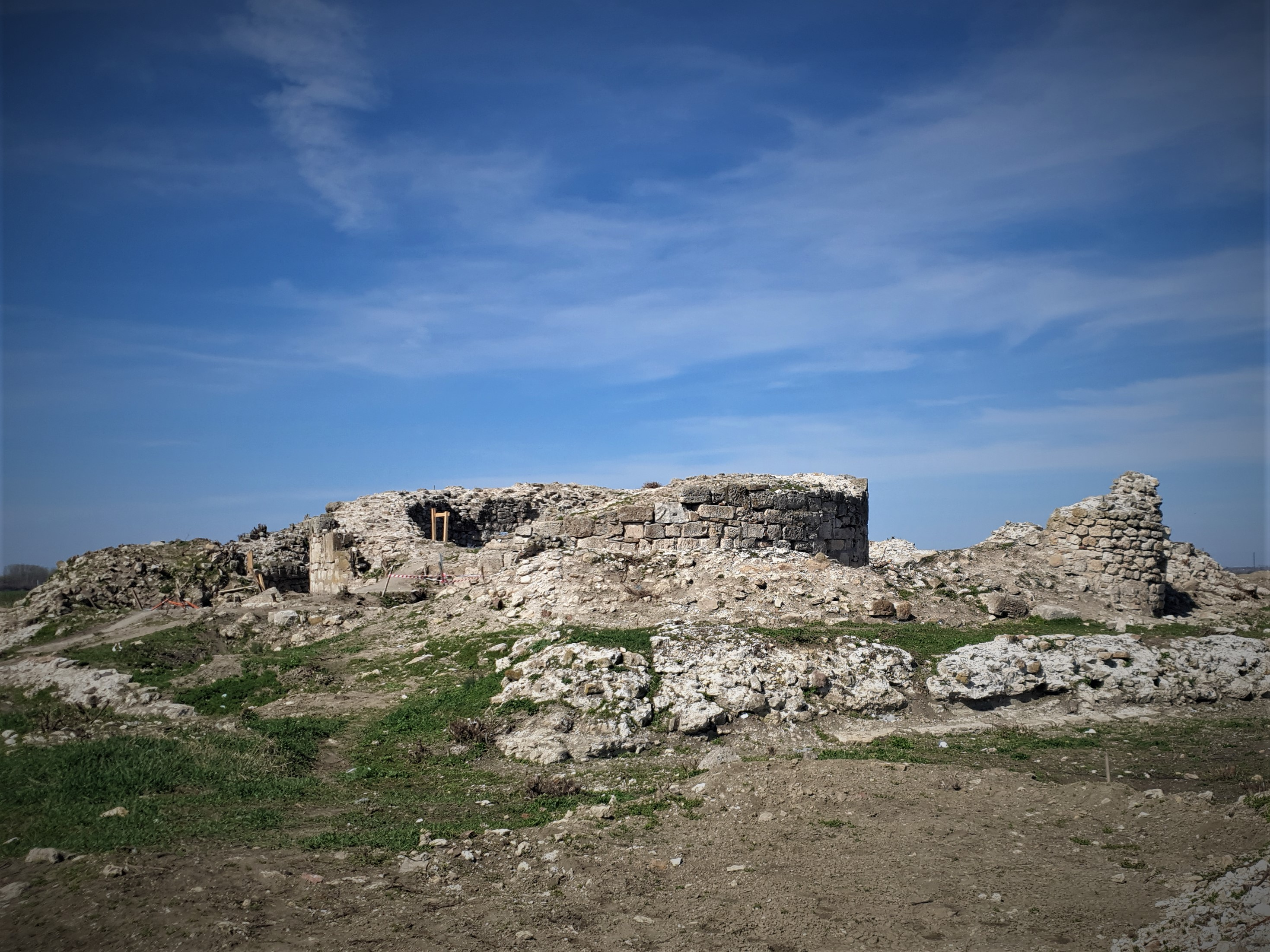 Cetatea Turnu in anul 2019